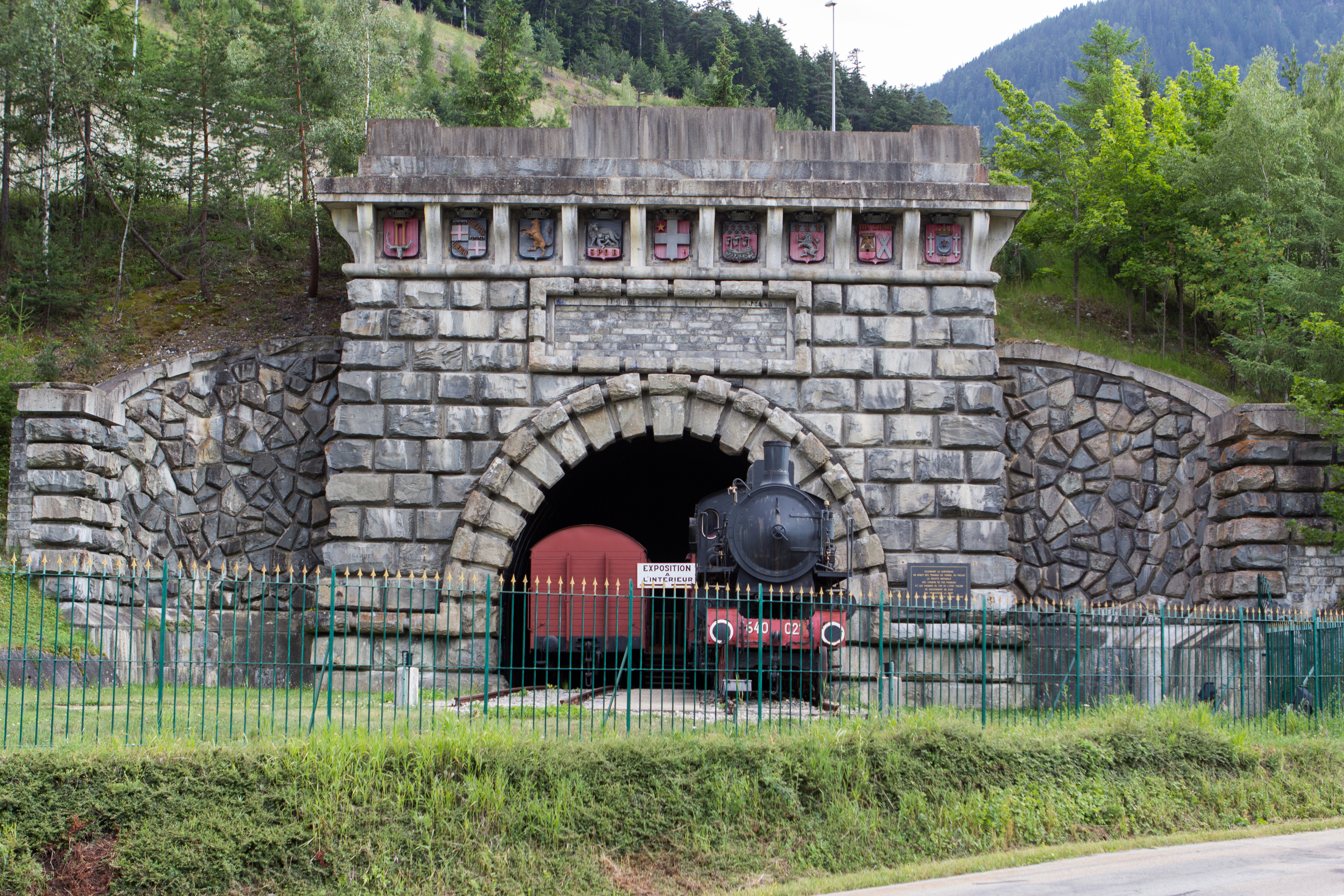 Ancienne entrée du tunnel ferroviaire du Mont-Cenis, coté français - Modane, Savoie, France